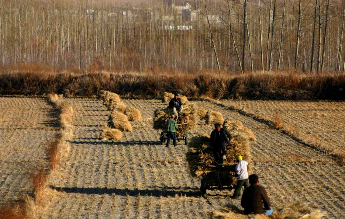 Agriculture in China